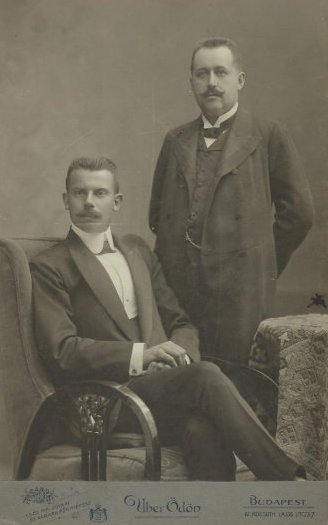 Dr. Just Sándor és Hanaman Ferenc közös fényképe. Baloldalon Hanaman, jobboldalt áll Just.